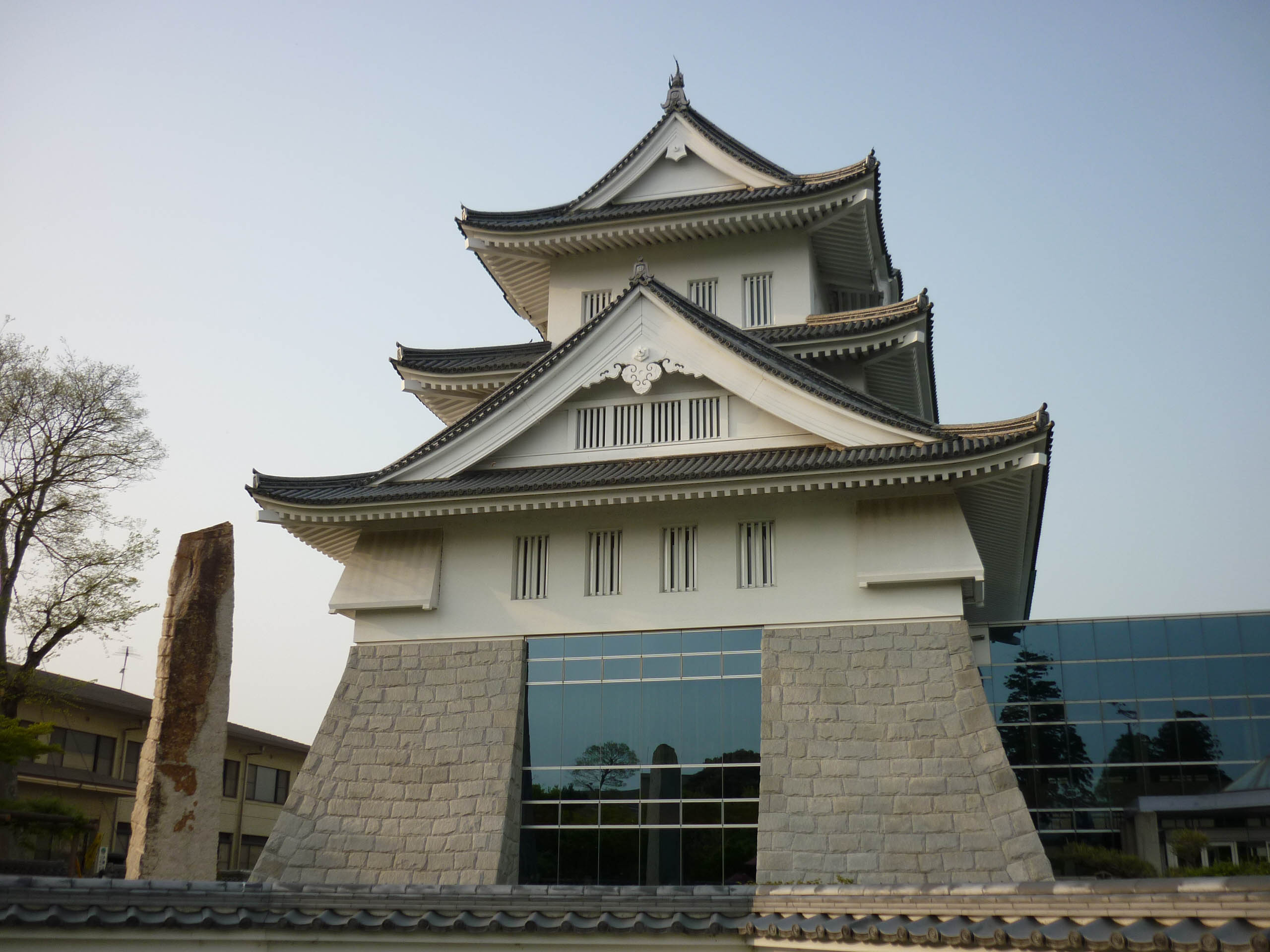 模擬天守